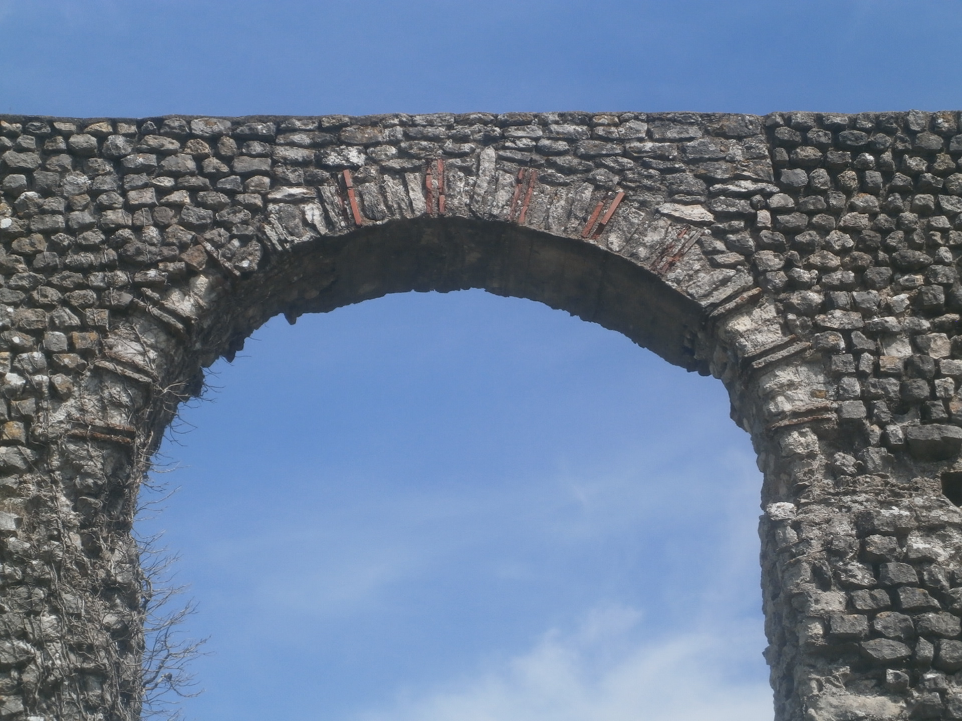 Aqueduc de Luynes. Détail des arches.